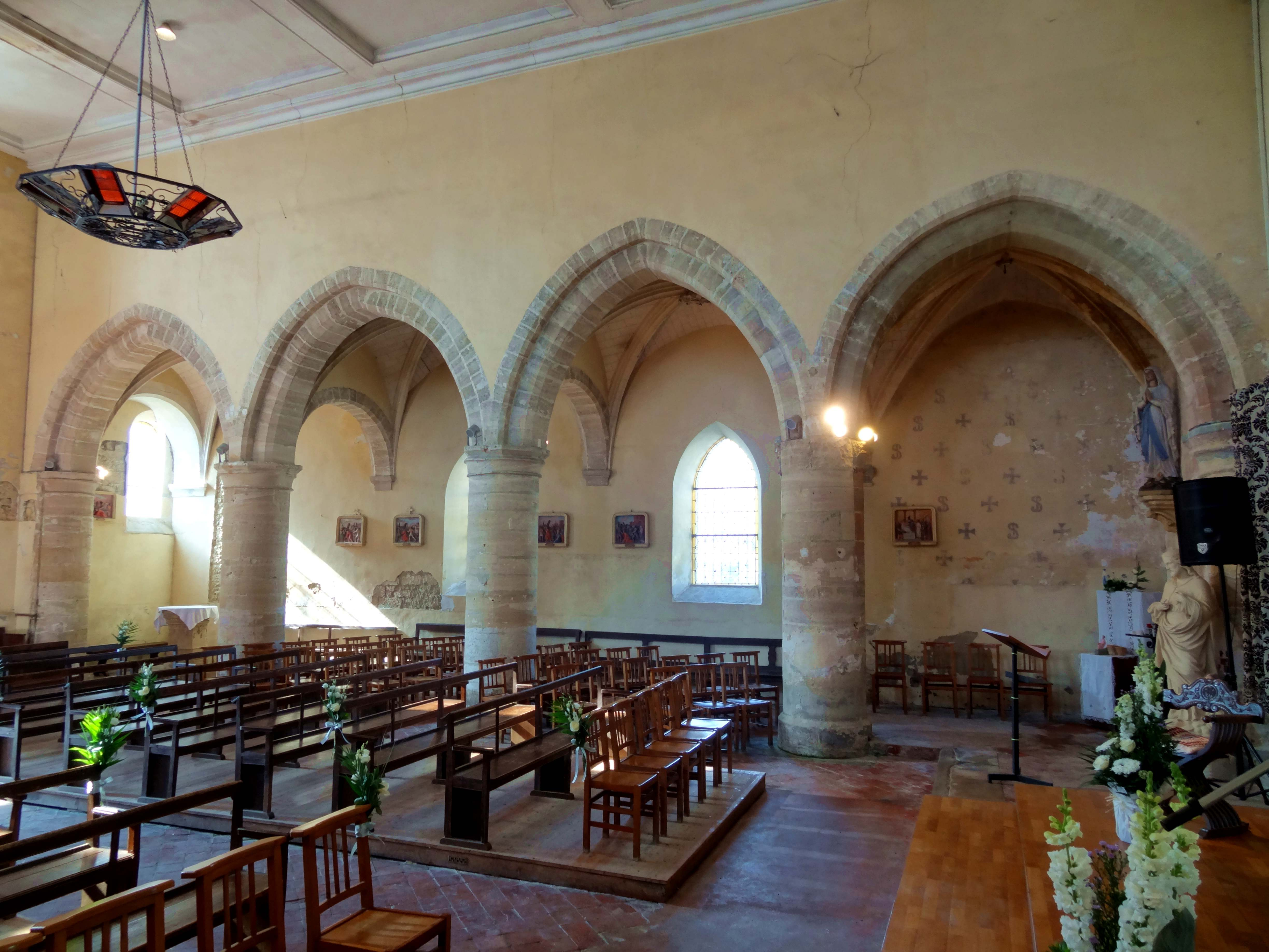 Intérieur de l'église - voir titre.